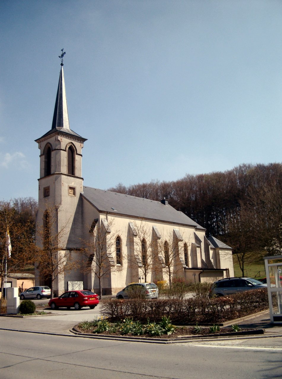 Kierch vu Bruch (Miersch); Source: Eege Foto vum :lb:User:Pecalux ; Datum: 22.04.2006